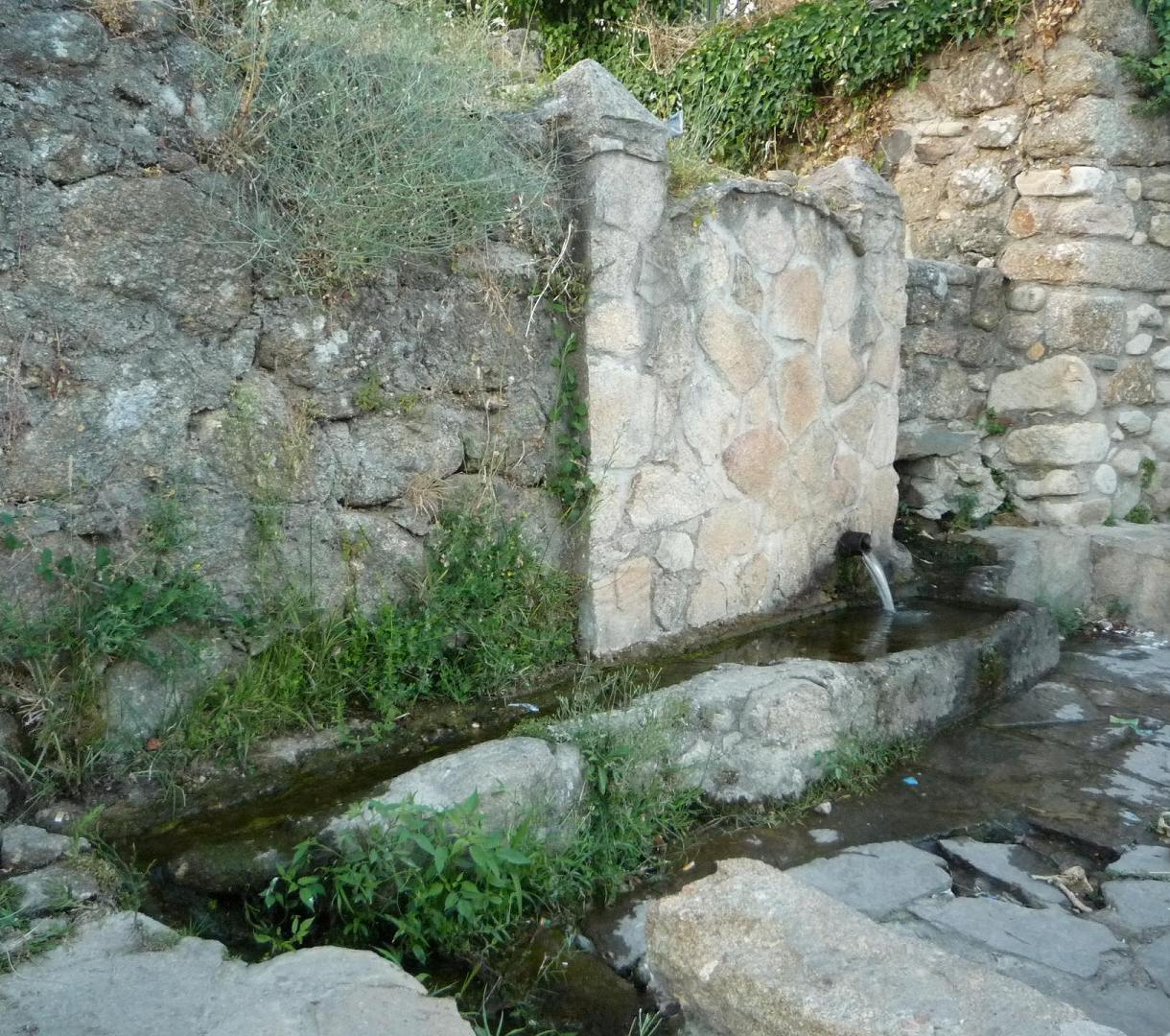 Gata abrevadero 3